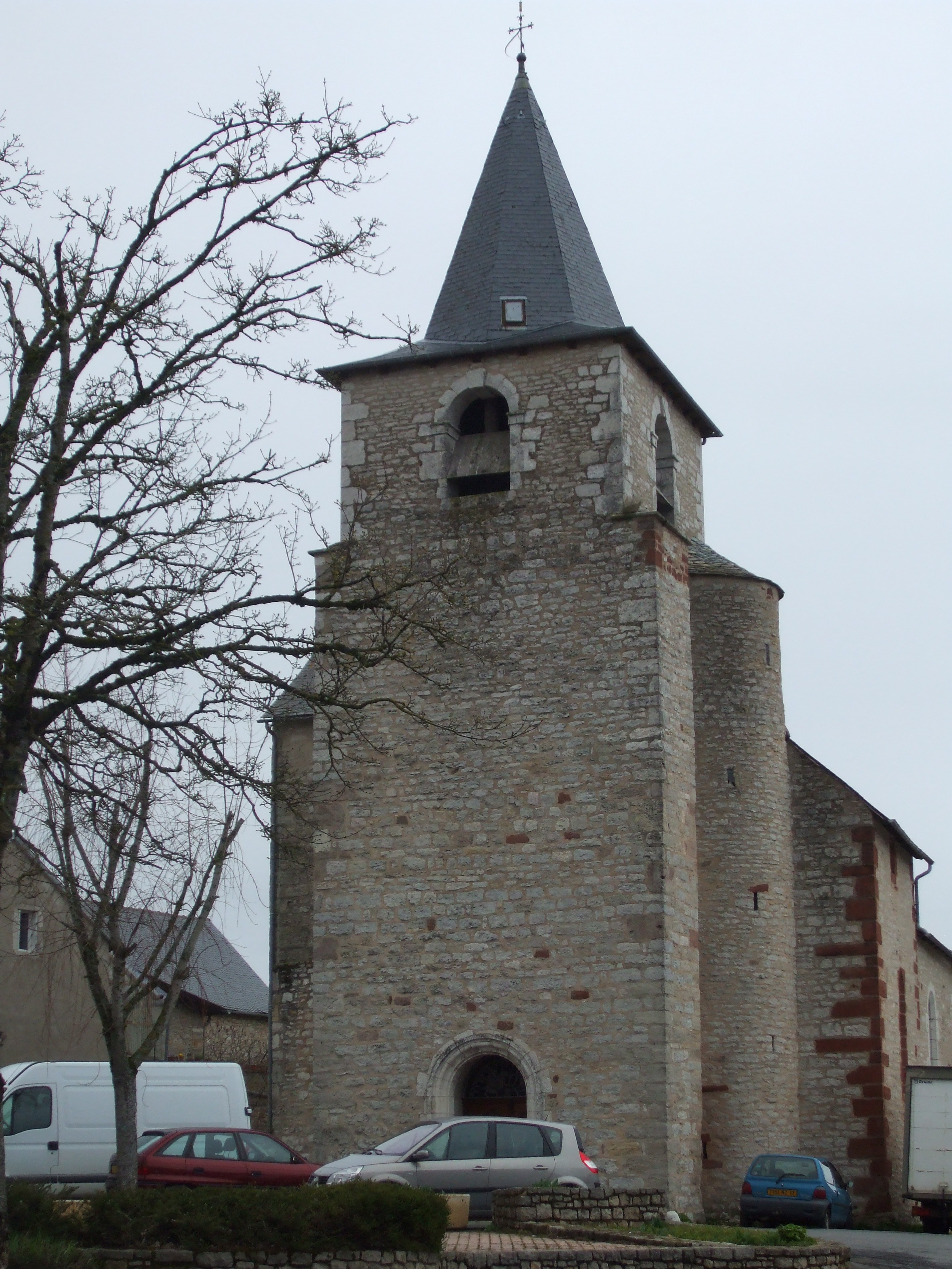 L'église de Sébazac